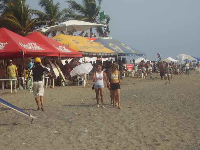 Etapa 2 del circuito nacional de surf en Nexpa del estado de Michoacán.